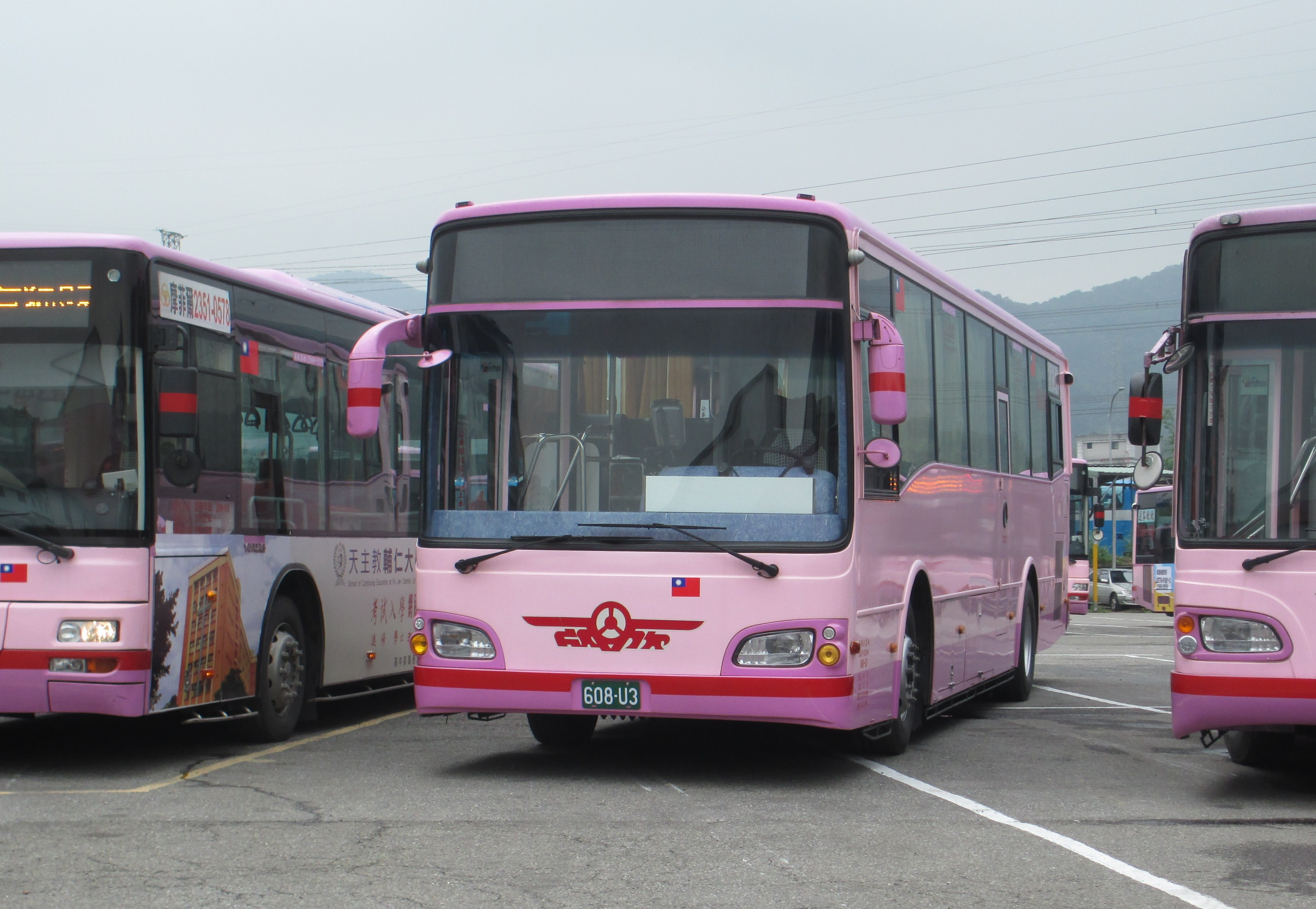 欣欣客運2014年日野HINO RK8JRVA-KJF固亞車體普通遊覽車608-U3。